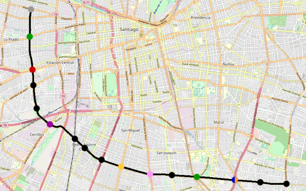 Mapa con el trazado propuesto para la Línea 10 del Metro de Santiago This map may be incomplete, and may contain errors. Don't rely solely on it for navigation.